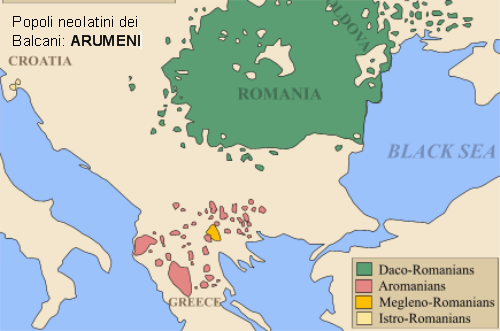 Arumeni nei Balcani. Vlachs in the Balkans.